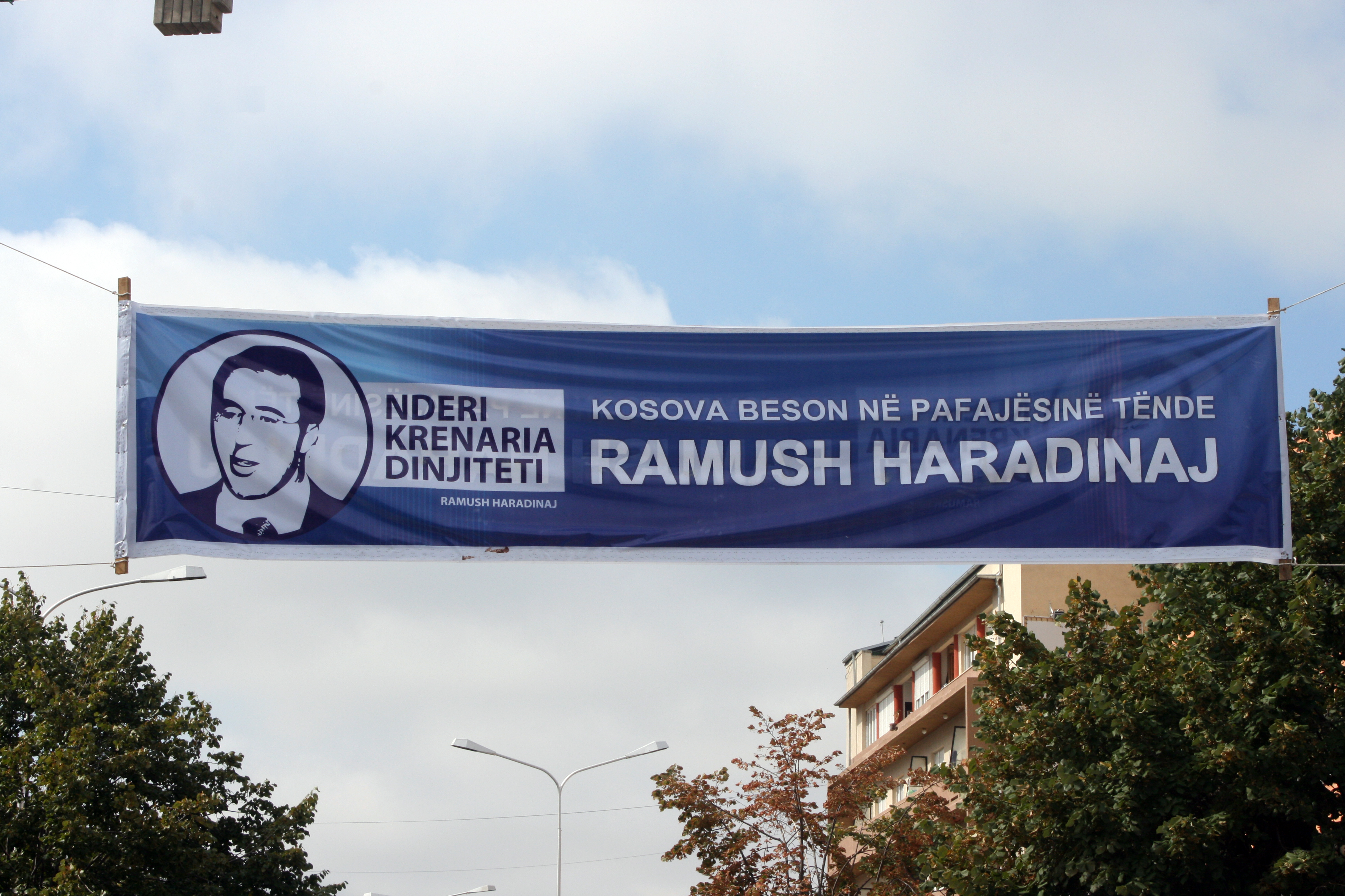 RH